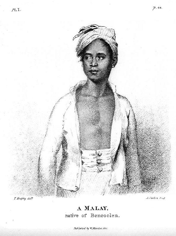 William Marsden: The History of Sumatra. Junger Malaie aus Benkulen.